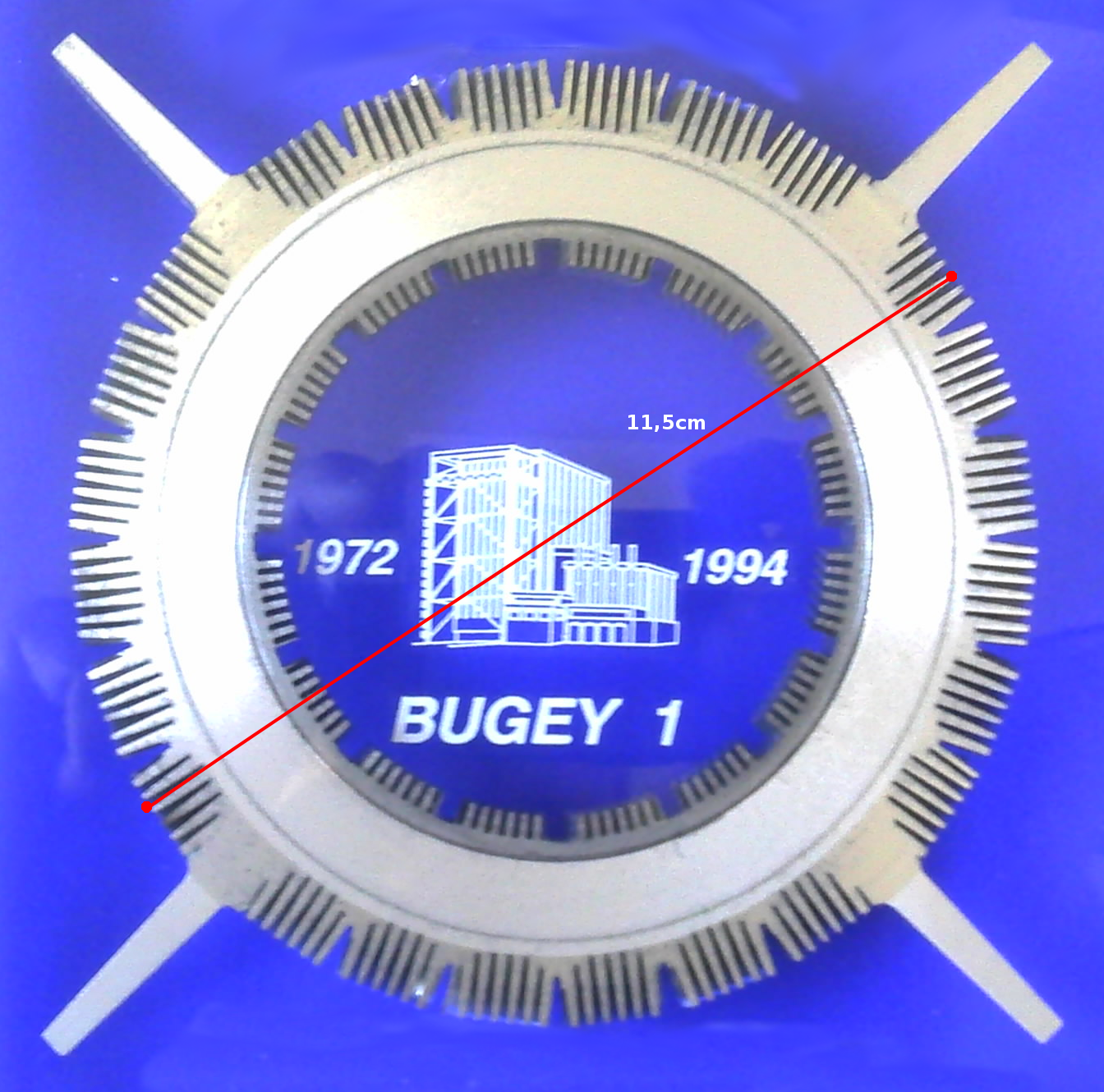 Cartouche de combustible Uranium naturel utilisée dans la filière française UNGG - centrale de Bugey1 arrêtée en 1994 après 22 années de fonctionnement - photographie de détail de la section